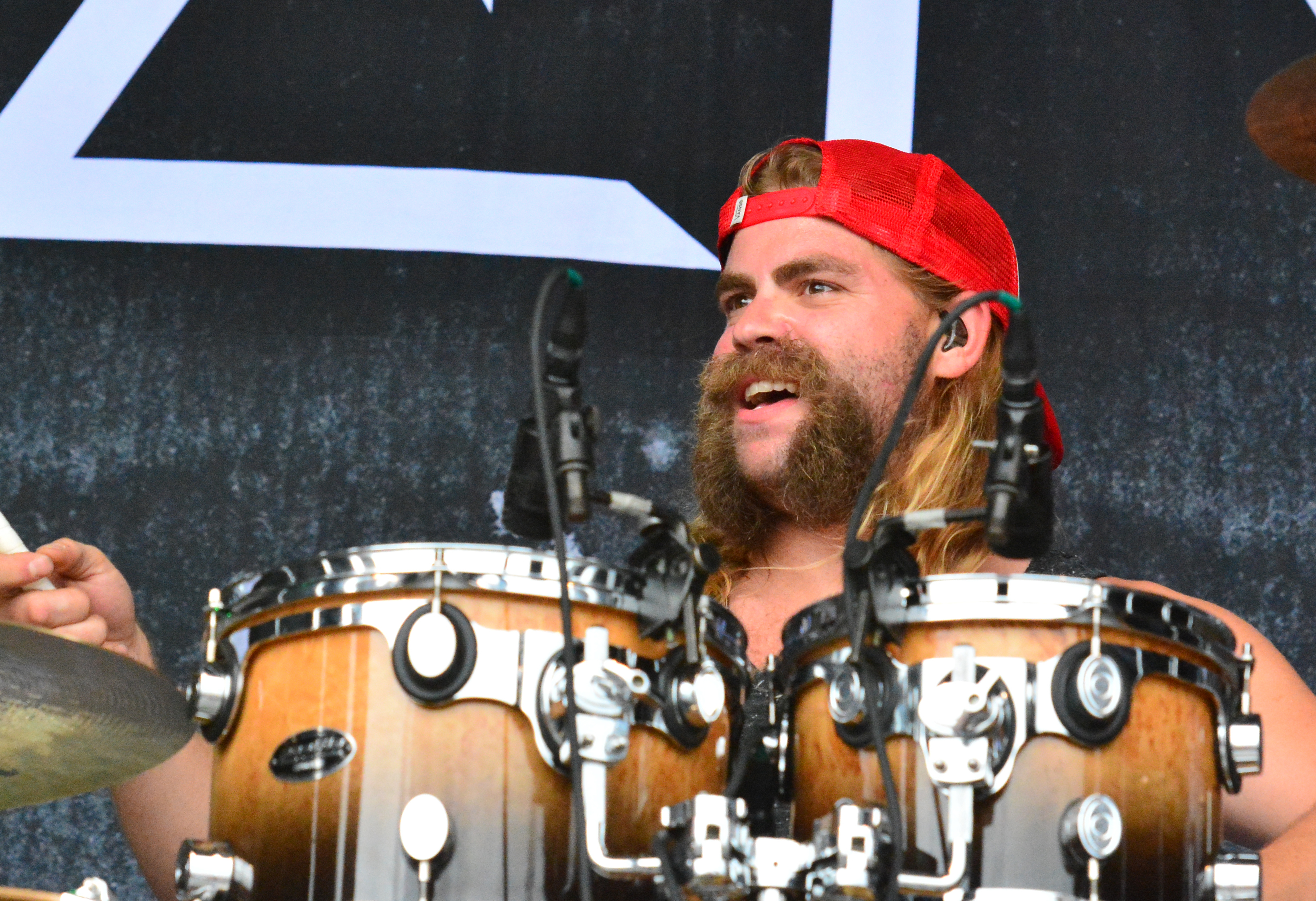 Schlagzeuger Jordan Mancino von Wovenwar beim Elbriot 2014